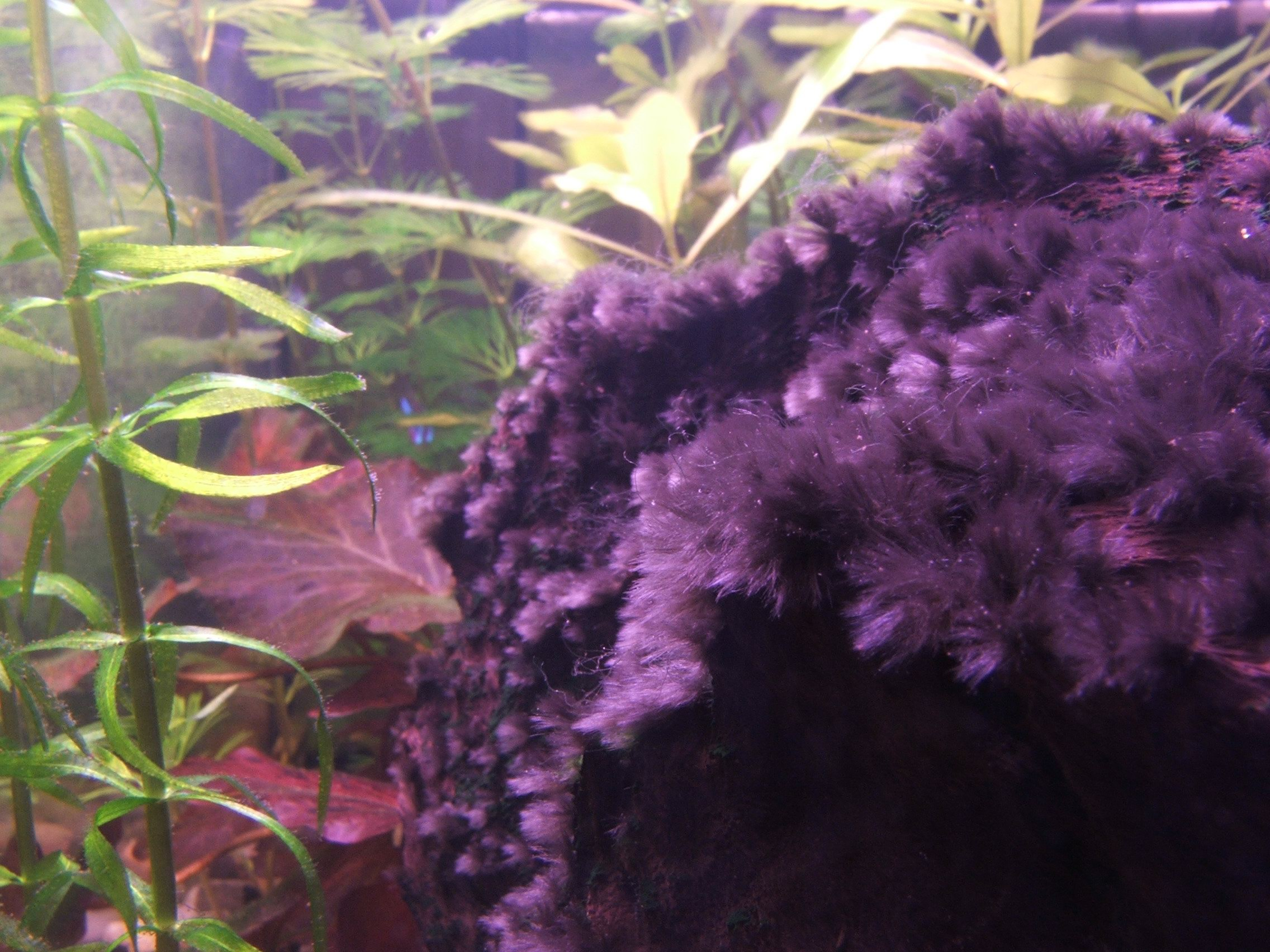 Chantransia sp.